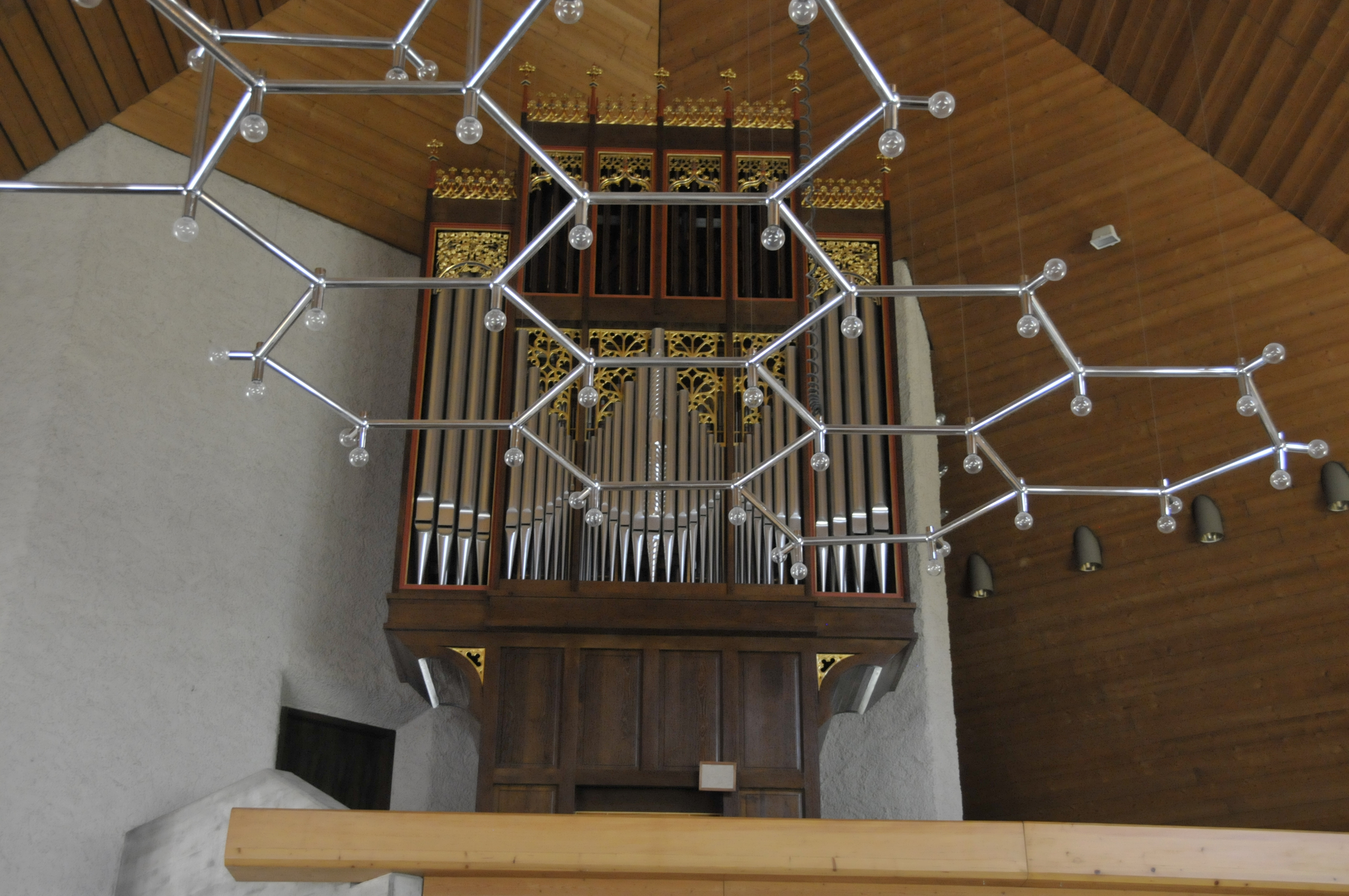 Schluchsee, St.-Nikolauskirche